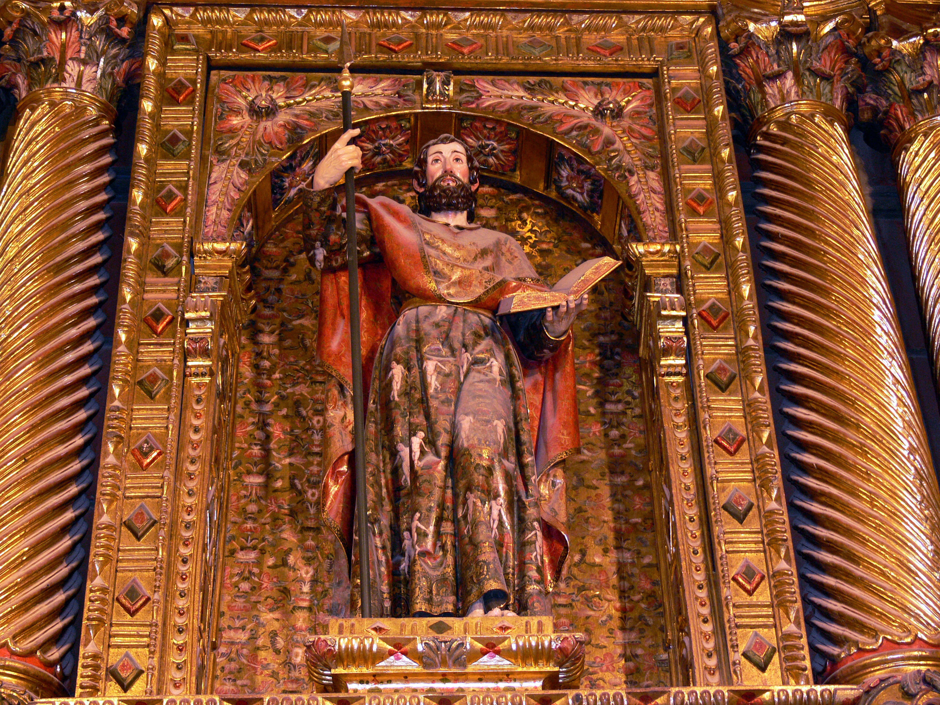 Iglesia de Santo Tomás en Arnedo, La Rioja (España).